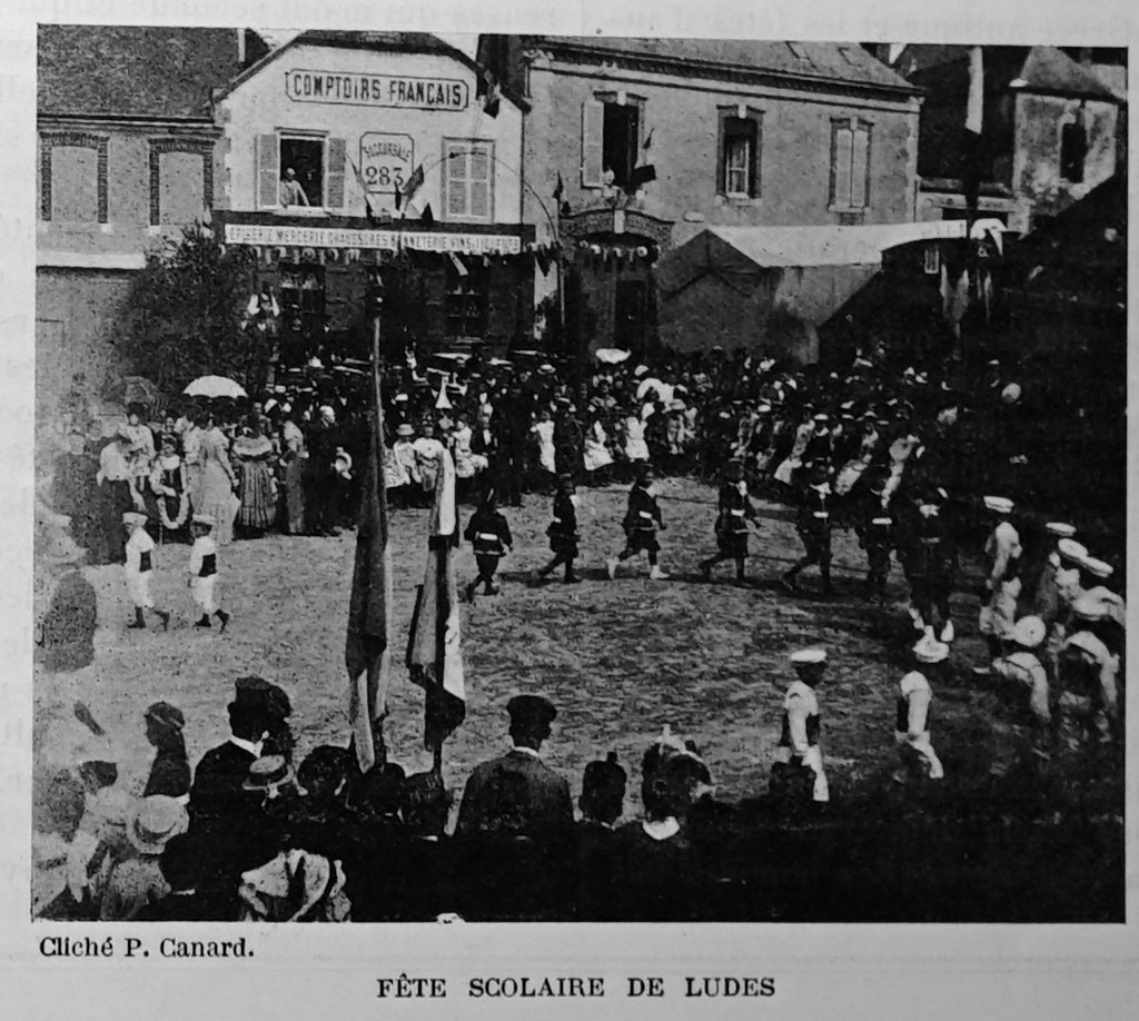 publié dans le "Bulletin de l'œuvre des voyages scolaires".